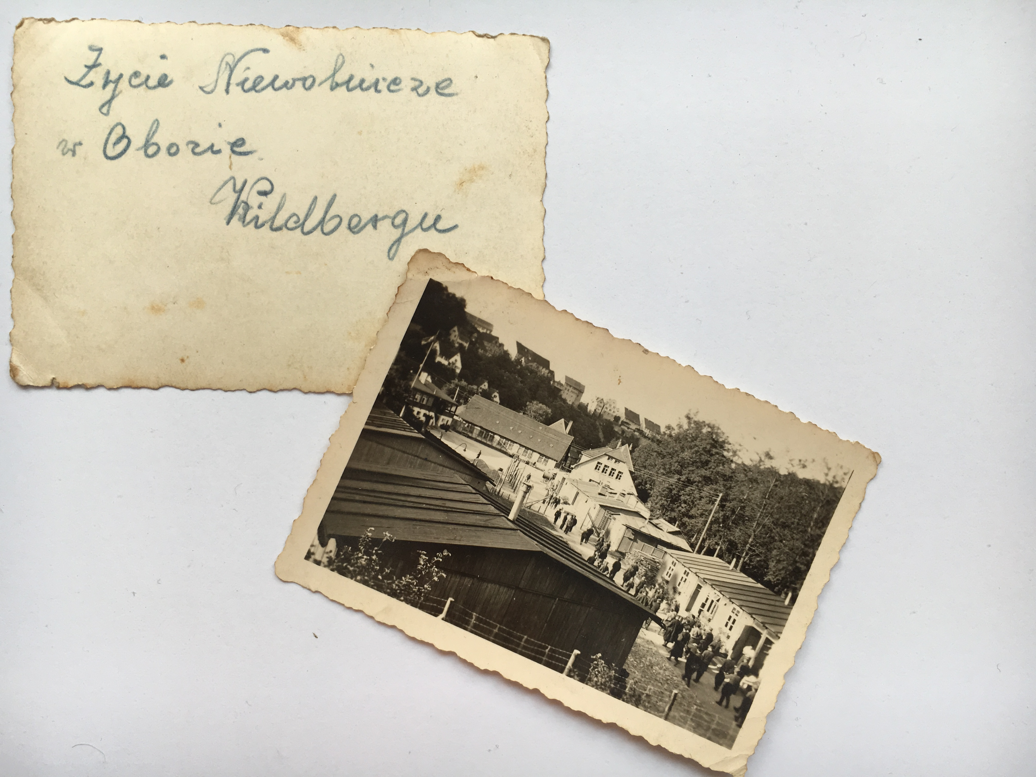 Na zdjęciu widoczny obóz Wildberg wraz z podpisem na odwrocie drugiej fotografii.